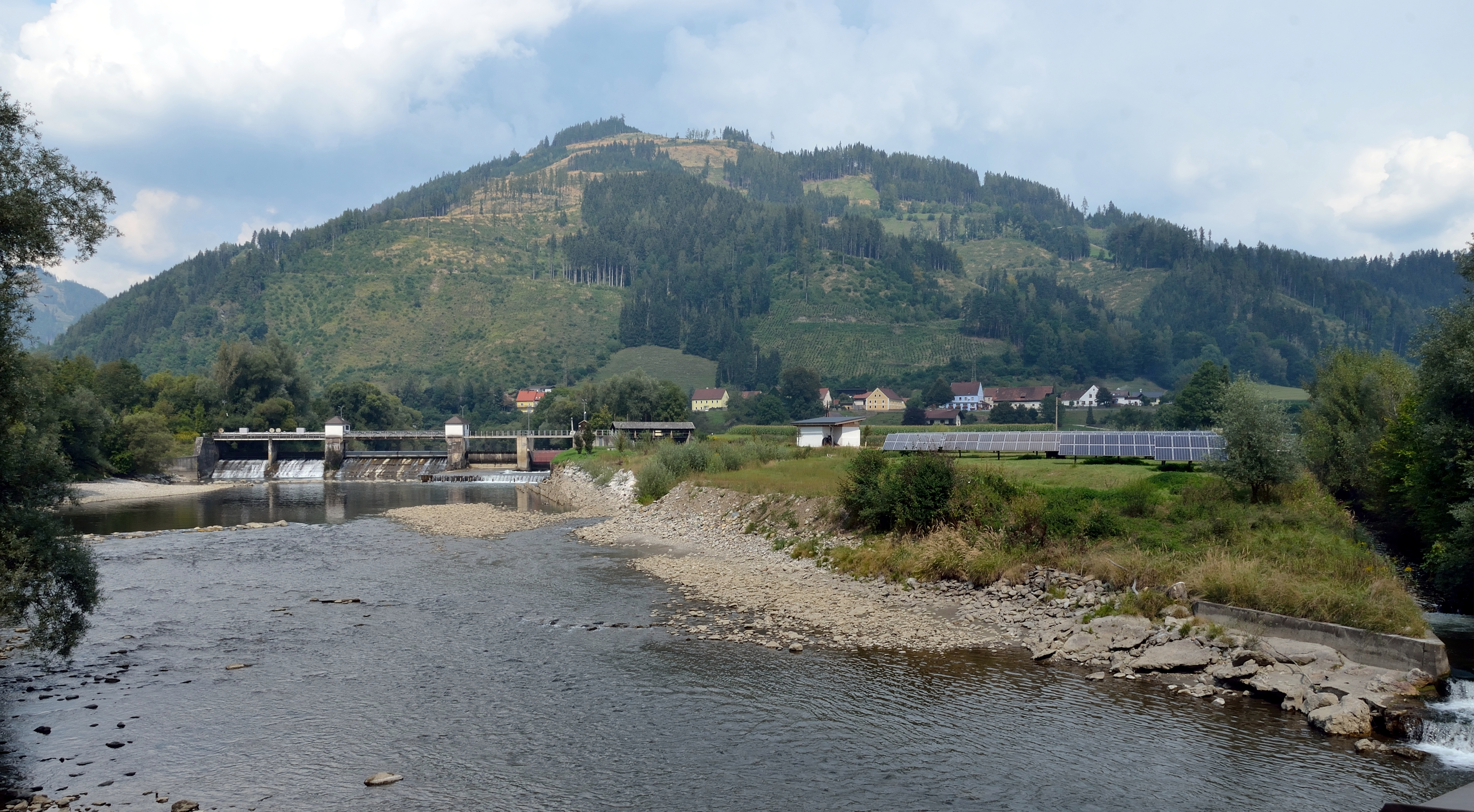 Die denkmalgeschützte Wehranlage an der Mur in Oberaich, Gemeinde Bruck an der Mur. Neben der Wehr ein Solarkraftwerk. Im Hintergrund das Madereck (1050m).